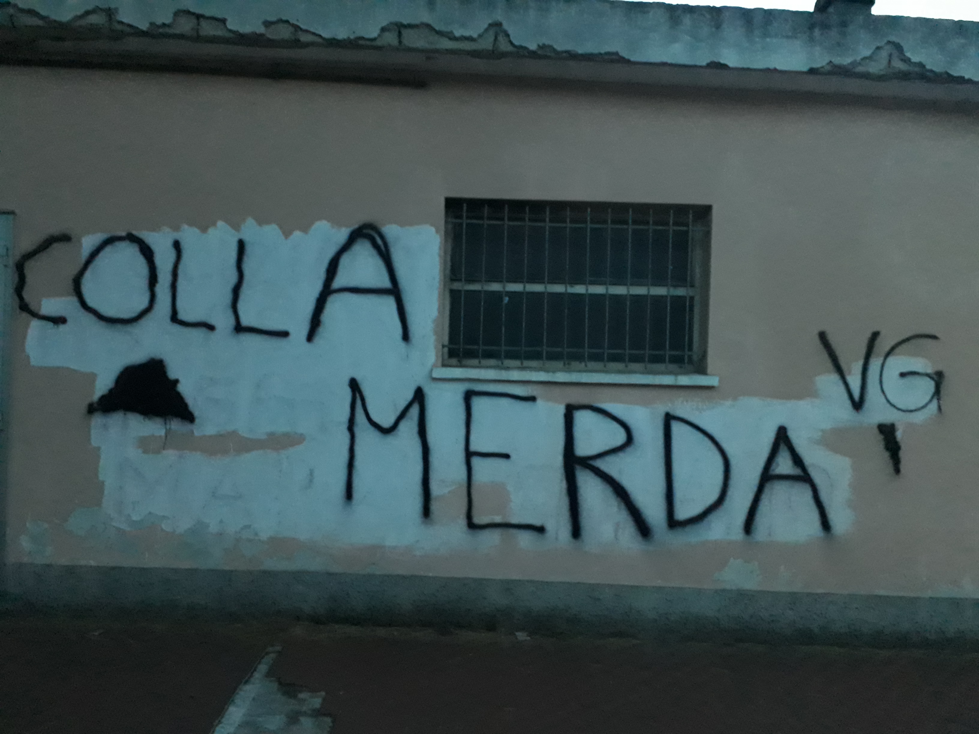 Scritte contro il patron dell'Albissola Calcio apparse nel luglio 2019 per le vie di Albisola Superiore (SV)